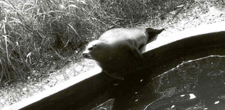 Zelfgemaakte foto in Burgers Zoo, zomer 2004.